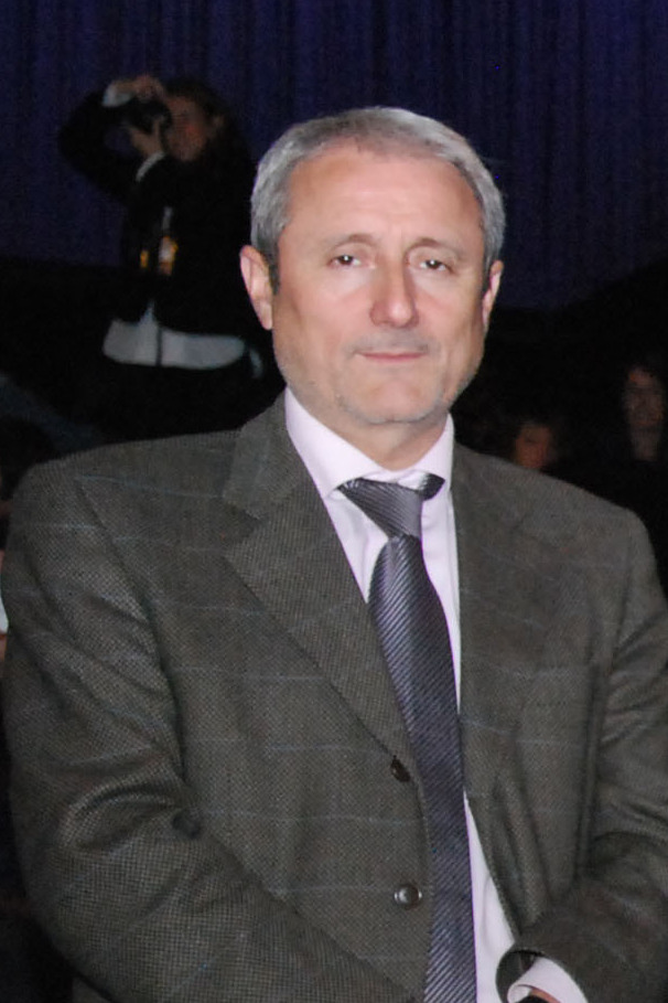 Inauguración FICVIÑA 2012.